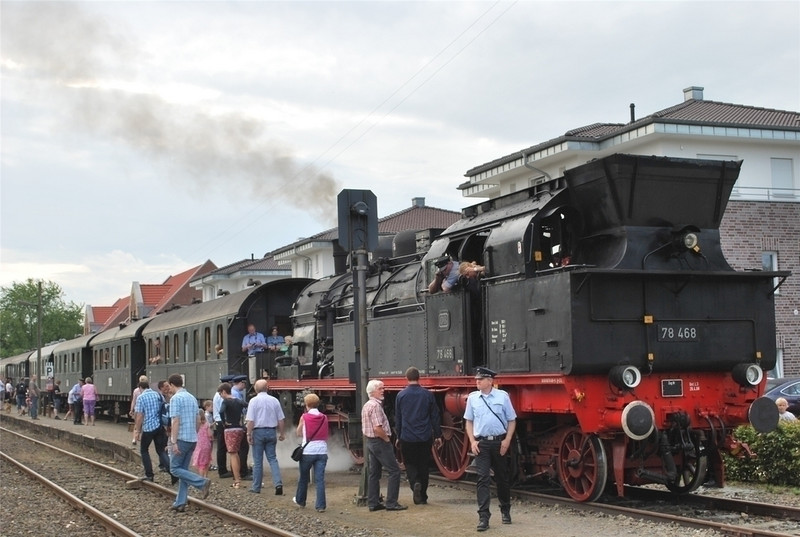 Reges Treiben herrscht im Bahnhof Bad Laer, wenn der Teuto-Express mit der preußischen Dampflok 78 468 zu einer Ausflugsfahrt auf der Teutoburger Wald-Eisenbahn (TWE) startet.